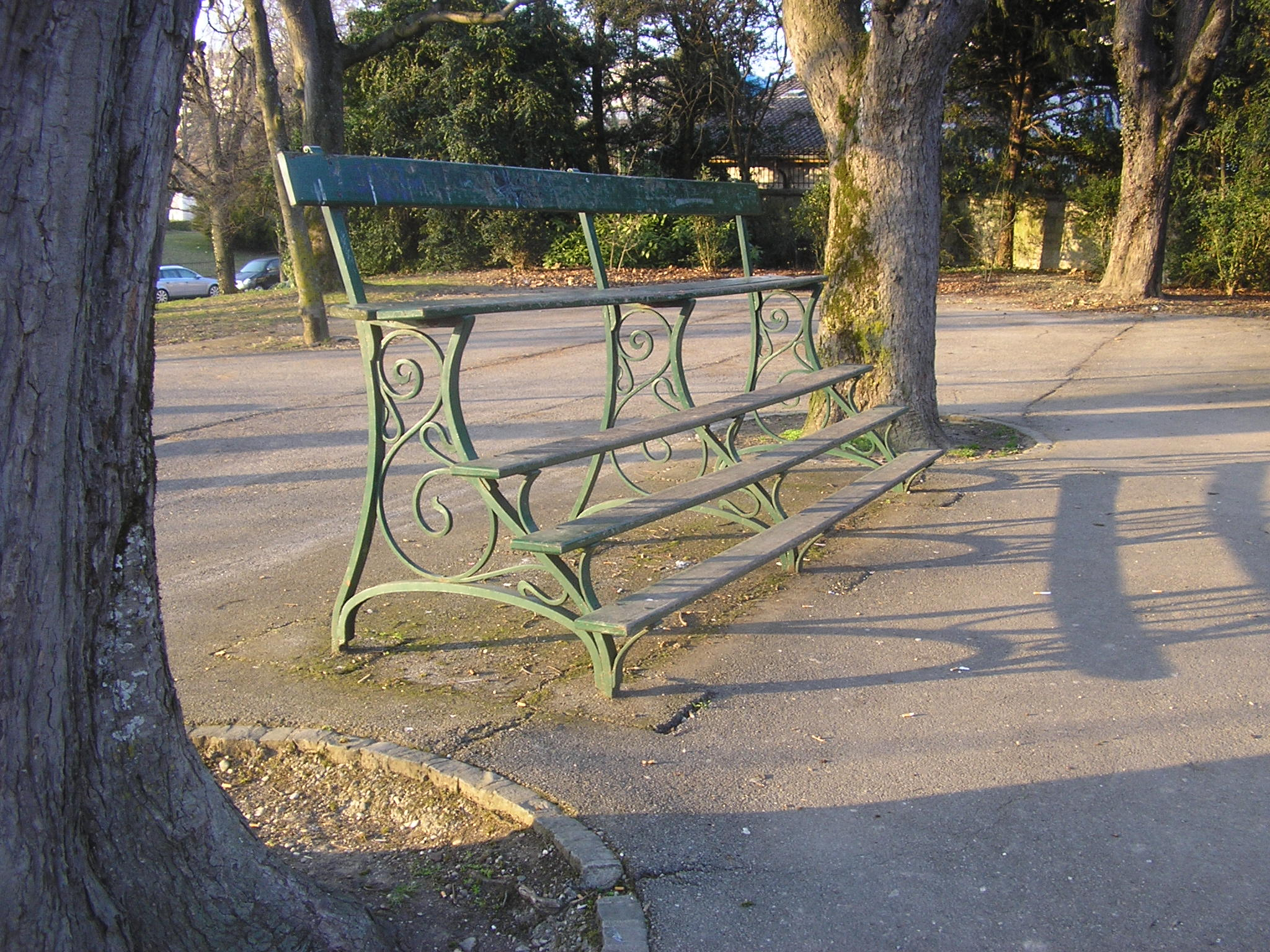 Banc à marches (ou «à étages»), à la promenade des Crêts au Petit-Saconnex à Genève, permettant d'admirer le Salève. Au même lieu, un autre banc comporte deux marches. Uniques en ville de Genève [1].